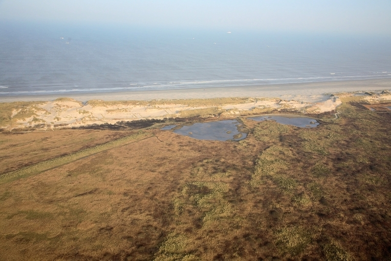 Terschellinger Natuurtochten - Nature Guide